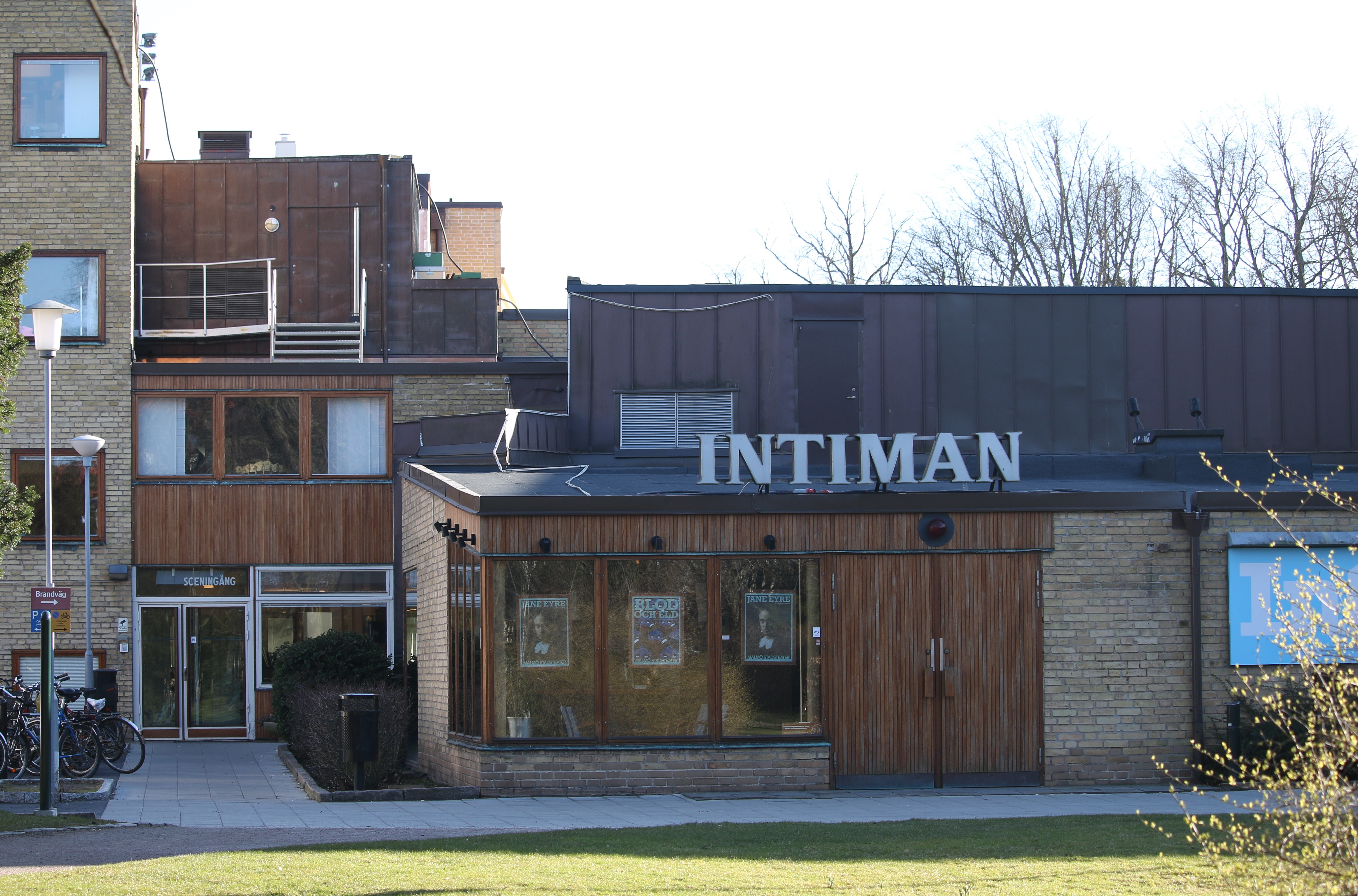 Intiman, Malmö, mars 2016